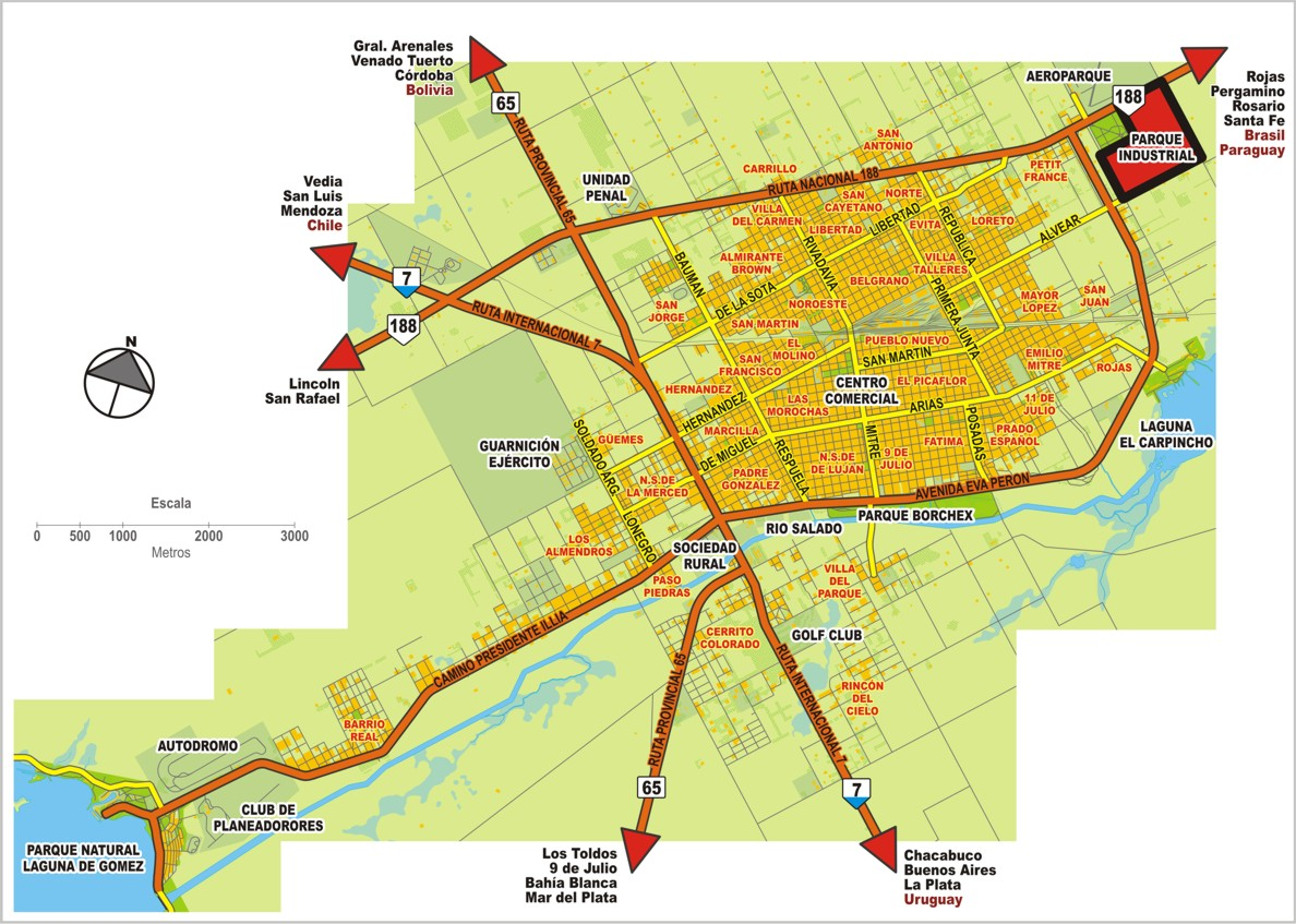 Ubicación del Parque industrial de Junín, en el plano de la ciudad.